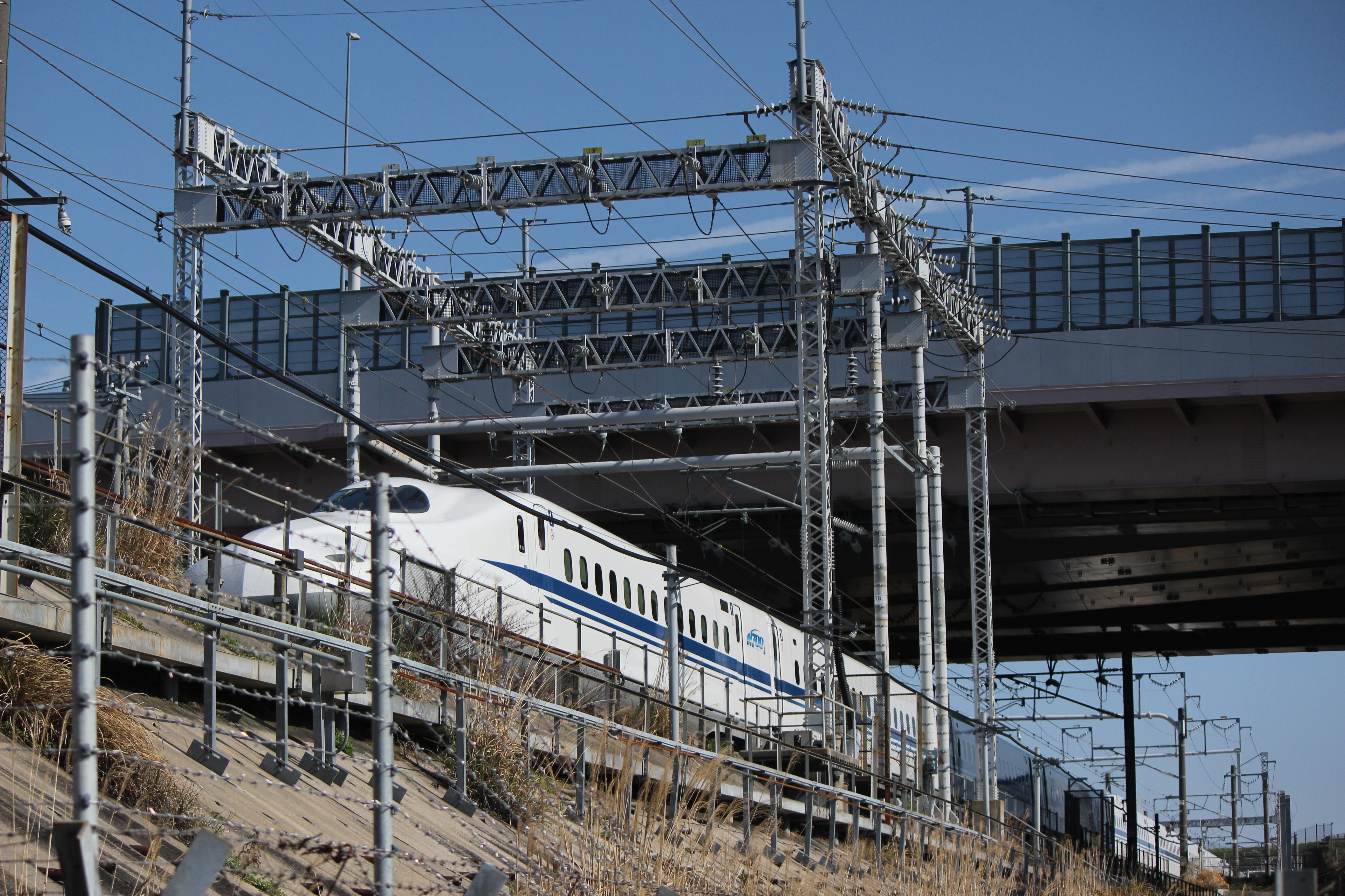 東海道新幹線の防護柵と立体交差（名古屋市緑区大高付近）